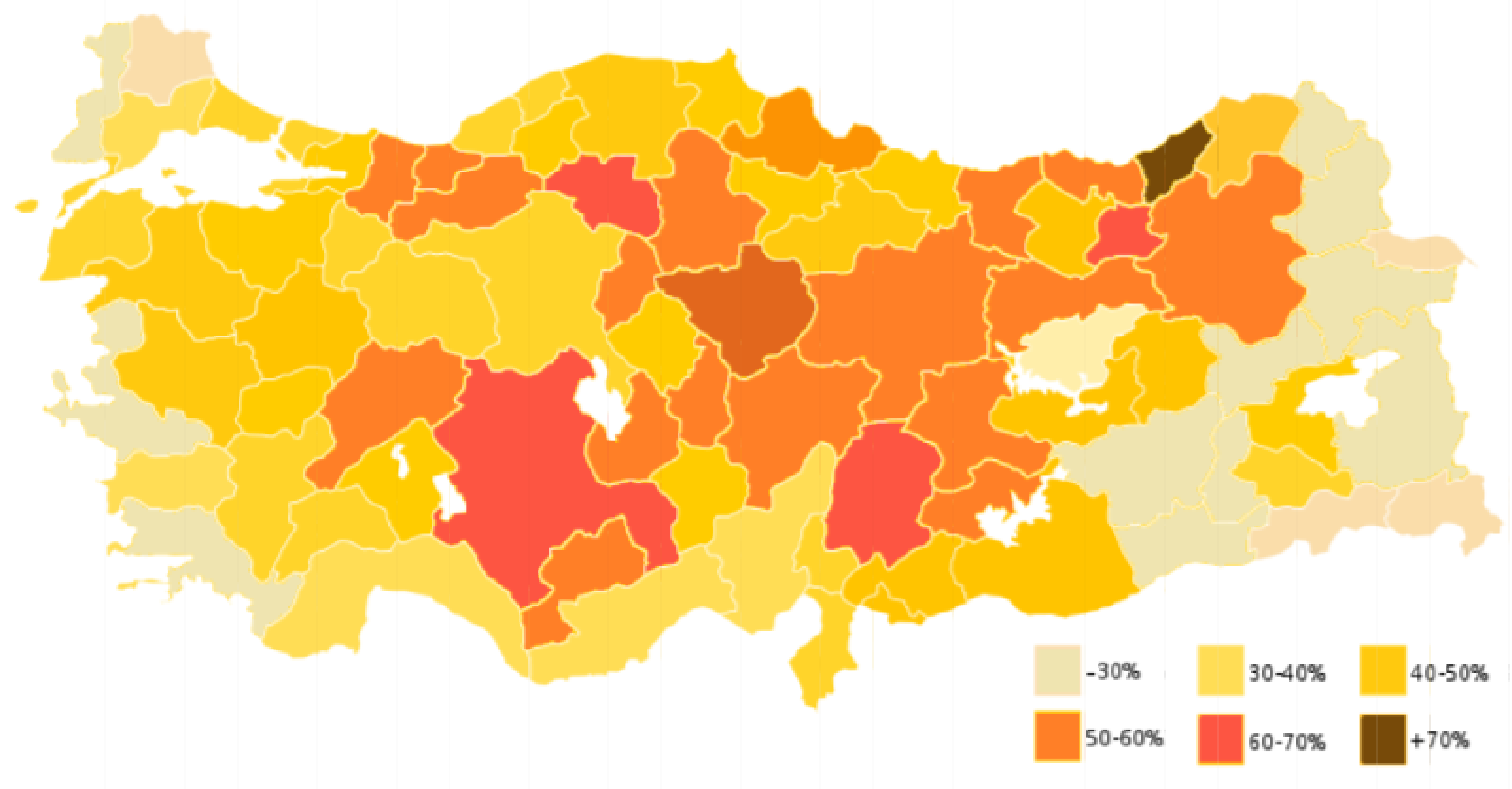 2015 AK Parti Genel Seçim Sonuçları